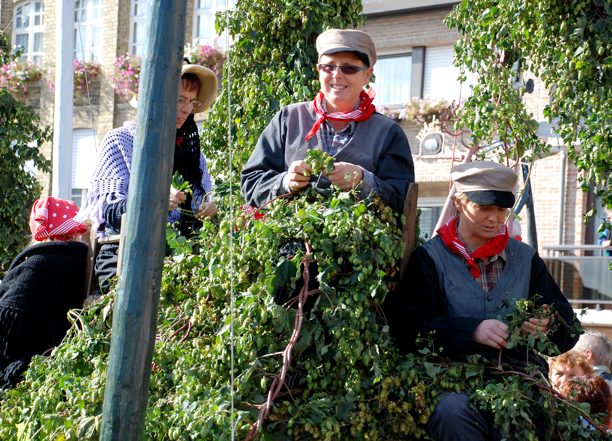 Hoppestoet Poperinge 2011